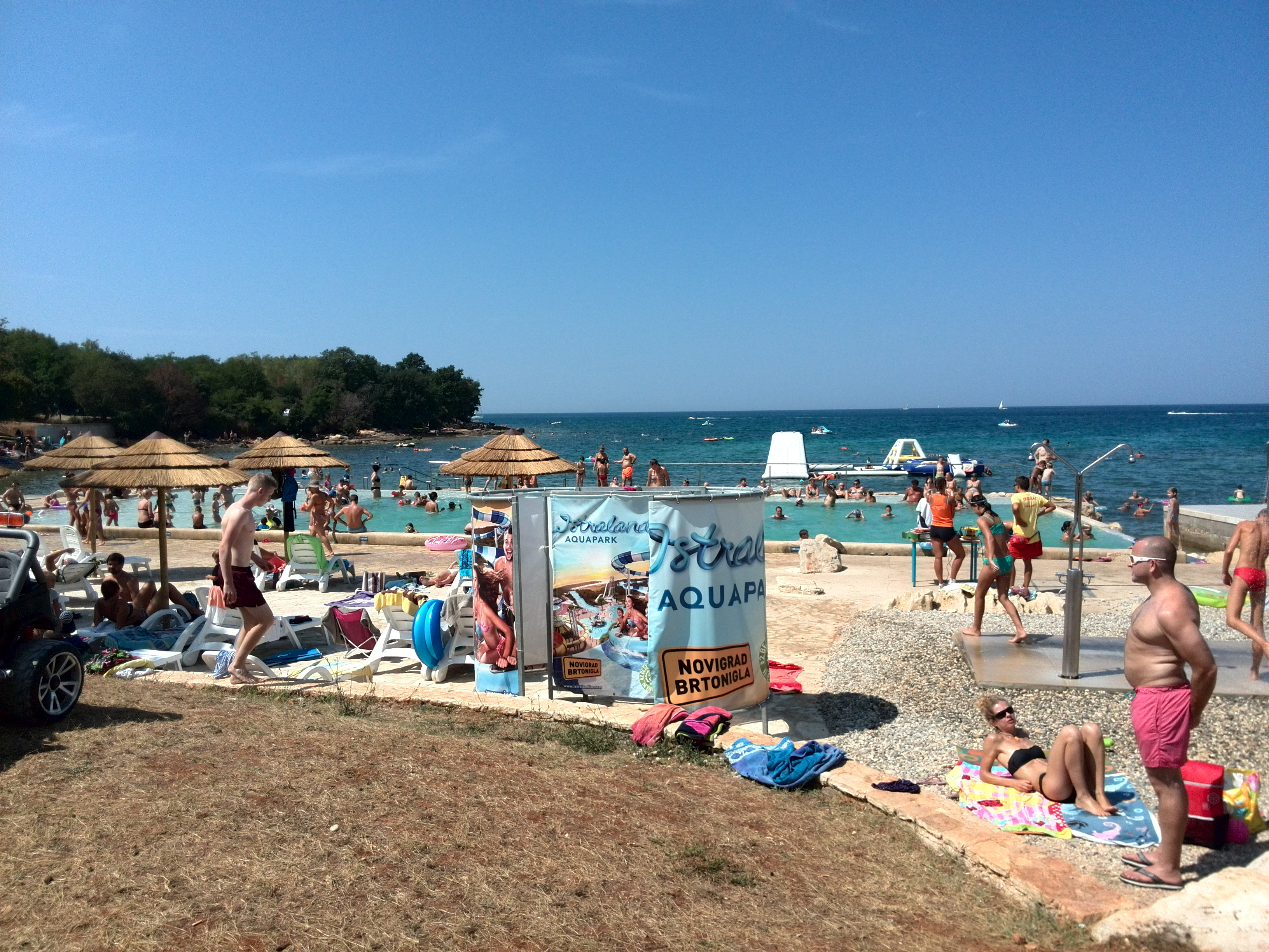 Camp in Mareda (Istra)